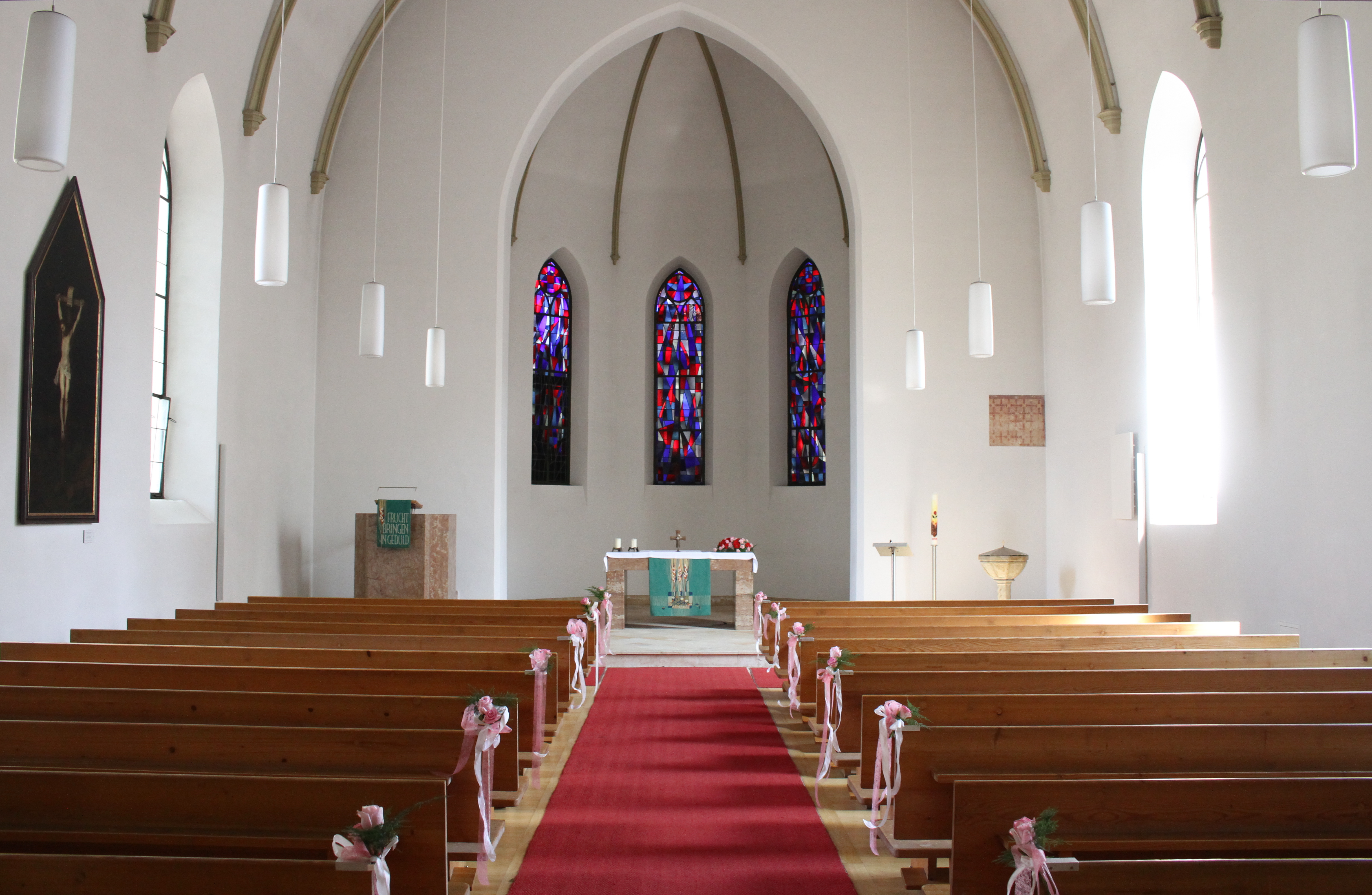 Paulus-Kirche in Perlach, München